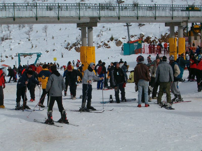 תמונה מאתר החרמון, חנוכה 2005. צילם י.ש. 15:39, 22 ינואר 2006 (UTC)